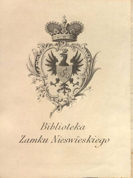 Экслібрыс бібліятэкі Нясвіжскага замку